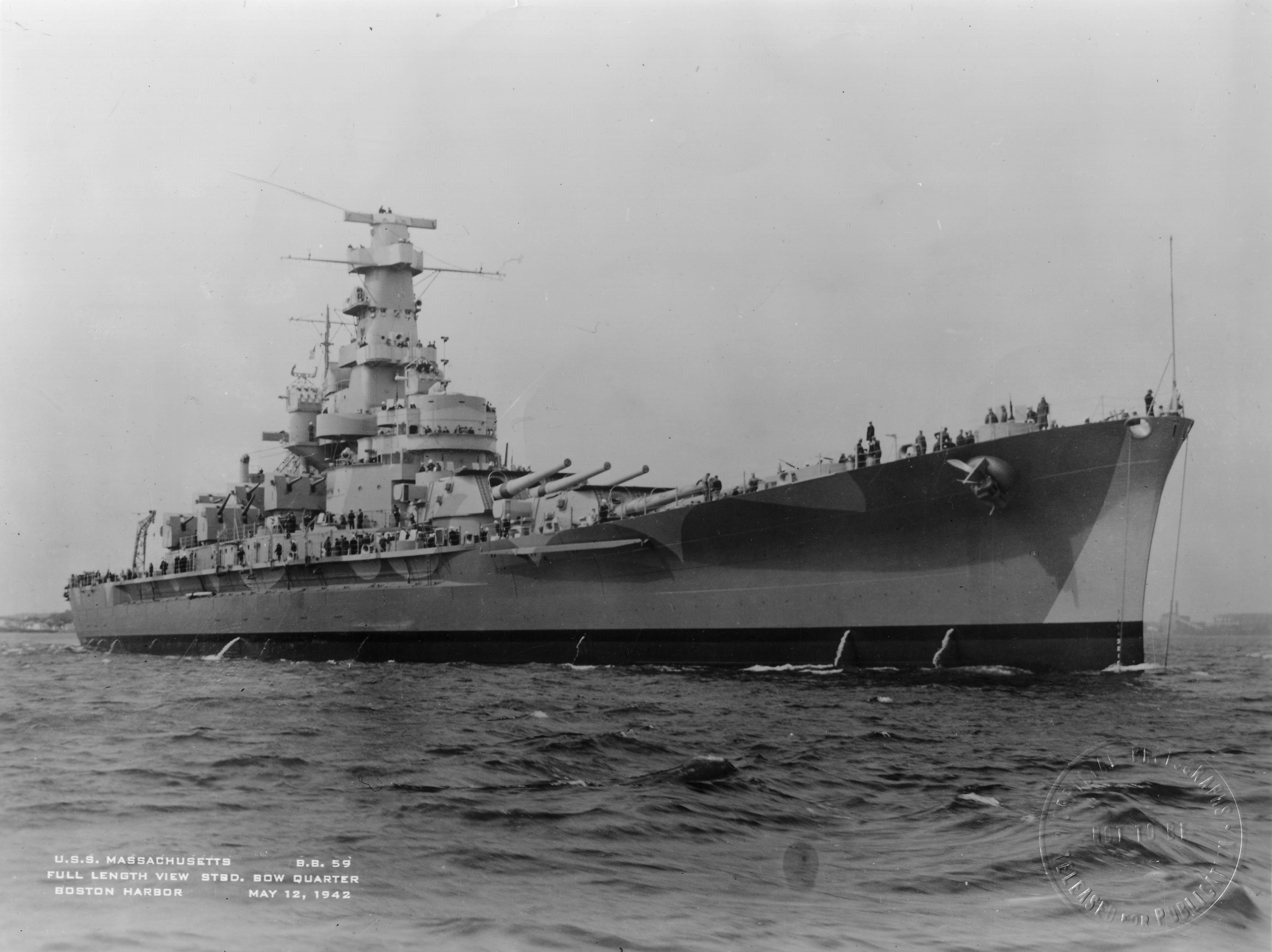 U.S.S. Massachusetts